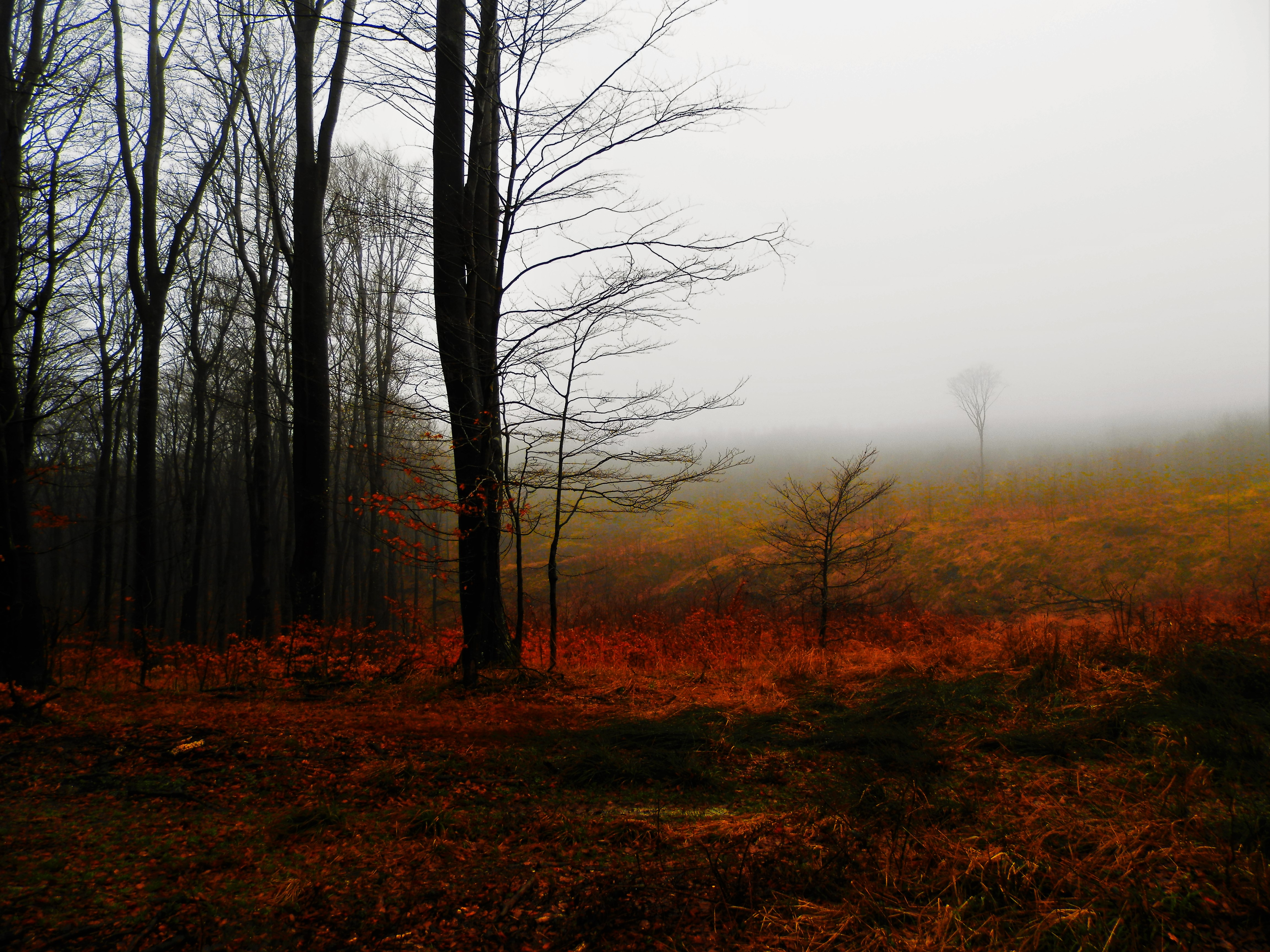 Krajolik Papuka